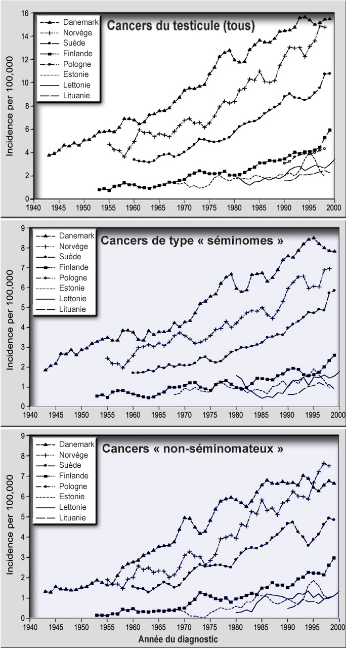 incidence (standardisée pur l'age) pour 8 pays d'Europe du Nord, de cancers des testicules (toutes formes confondues en haut) et de type séminomateux ou non-séminomateux pour des deux graphiques du bas), montrant une augmentation régulière du taux de ces cancers dans tous les pays. d'après données réunies par Lorenzo Richiardi & al., "Testicular Cancer Incidence in Eight Northern European Countries: Secular and Recent Trends" ; Cancer Epidemiol Biomarkers Prev December 2004 13; 2157Unknown